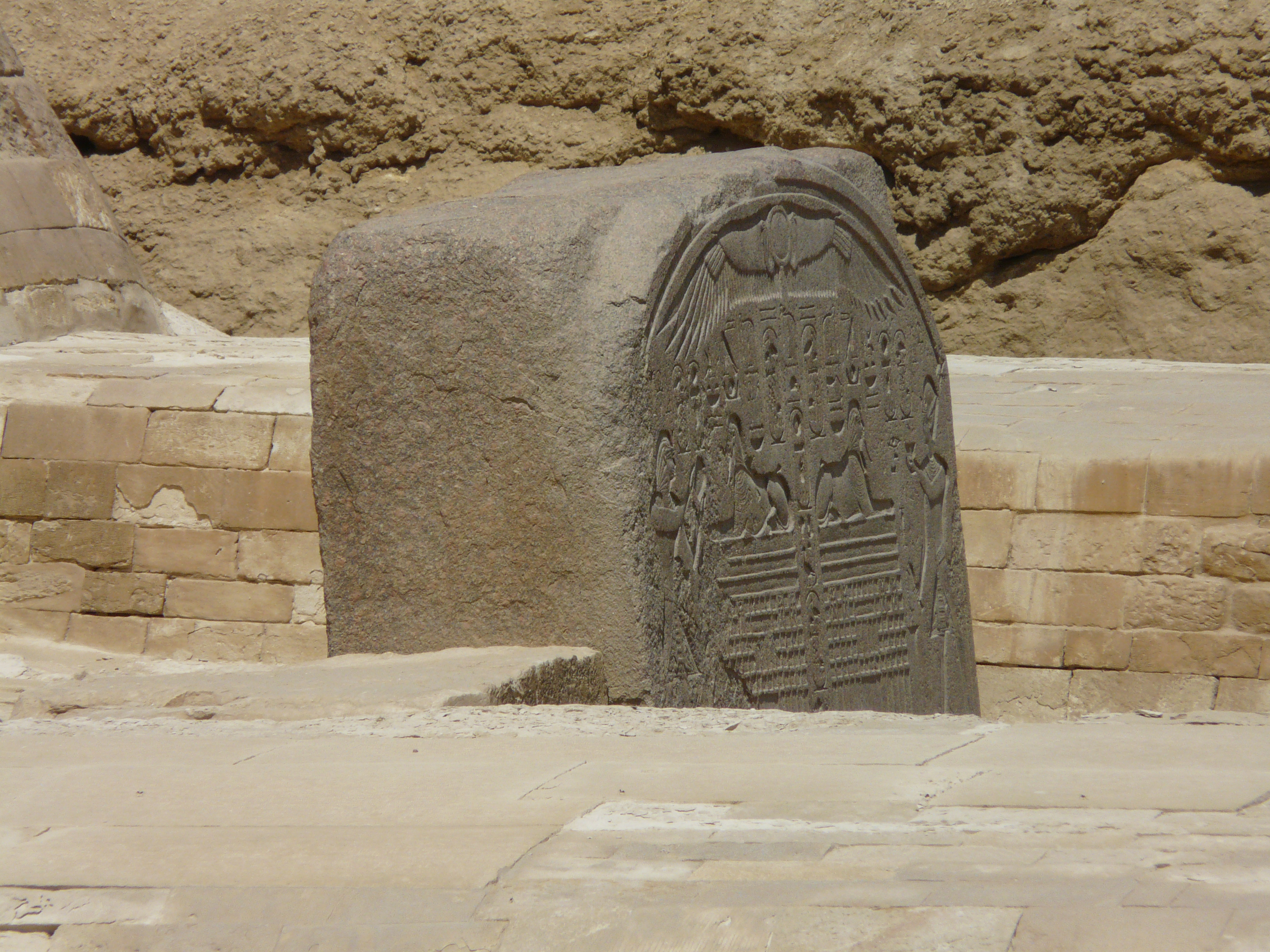 Plateau de Gizeh - Détail de la stèle du rêve de Thoutmôsis IV, entre les pattes du Sphinx